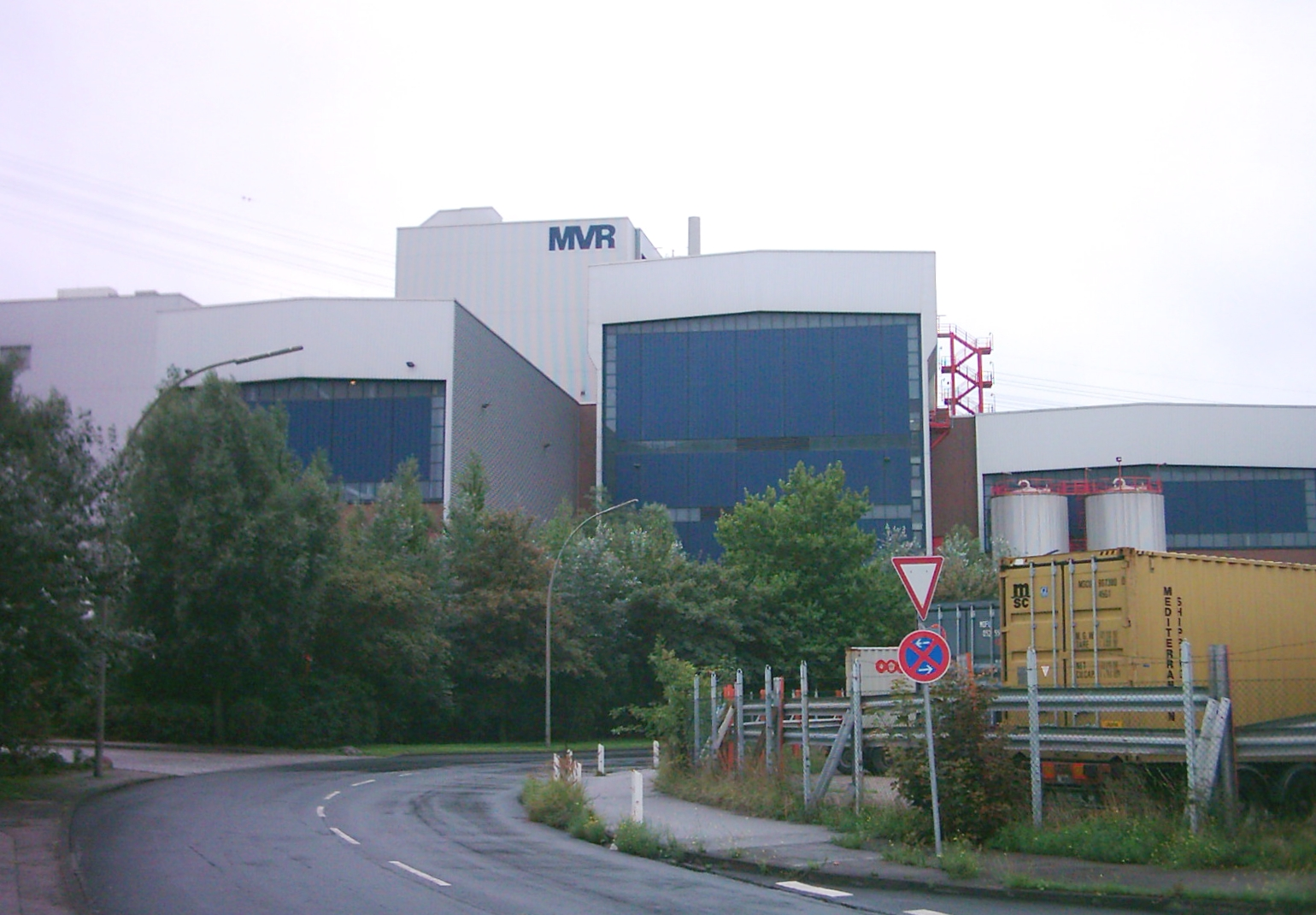 Müllverwertungsanlage Rugenberger Damm (MVR), Hamburg-Waltershof. Hauptgesellschafter der MVR ist Vattenfall Europe.